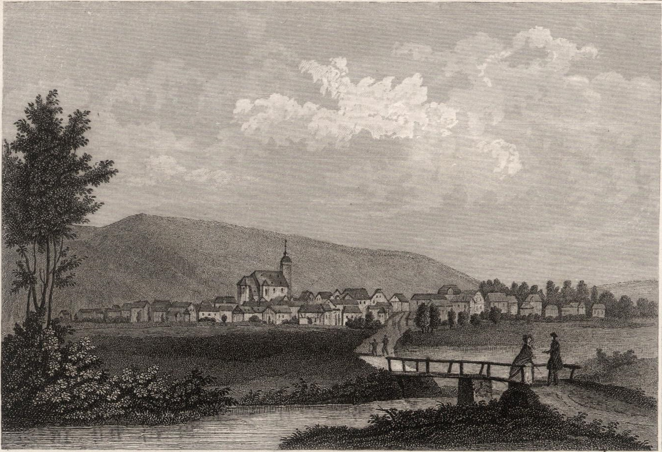 Dies ist ein Scan des historischen Dokuments: Stahlstich von Haiger um 1863